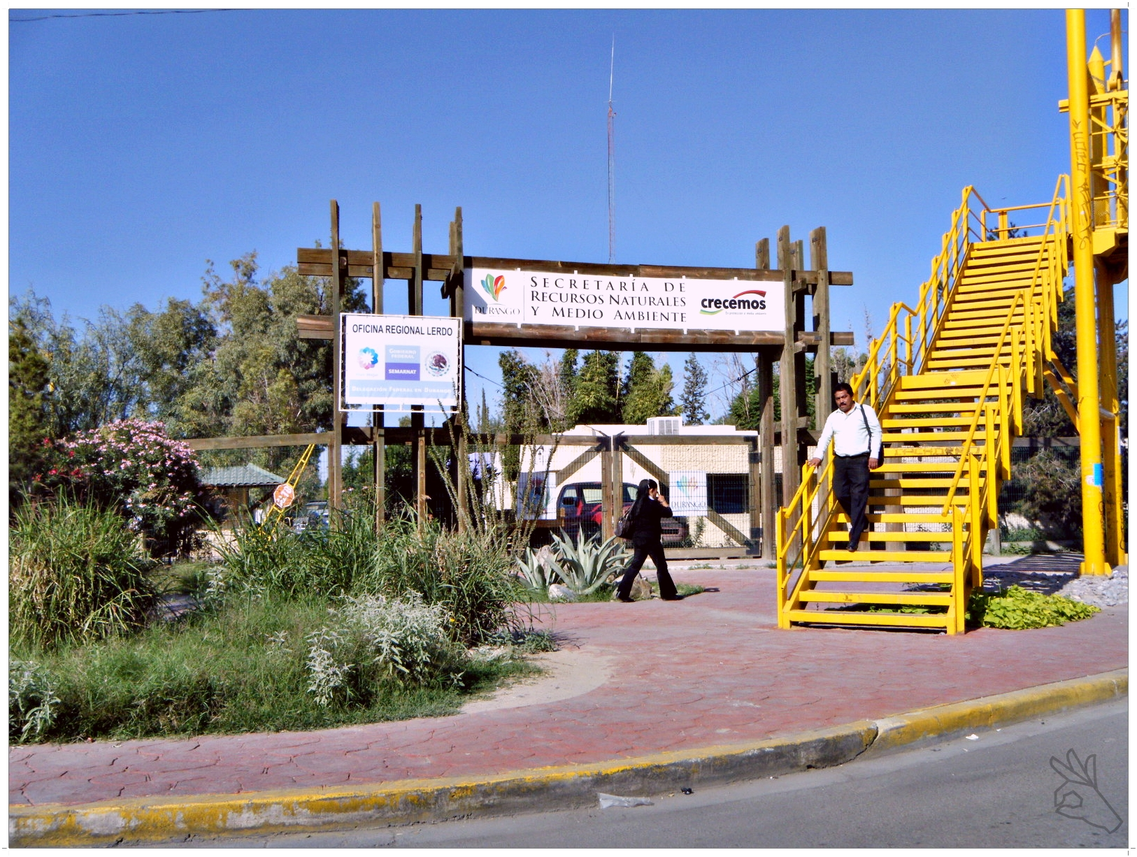 jardin